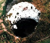 Dolina da crollo in Castel Morrone